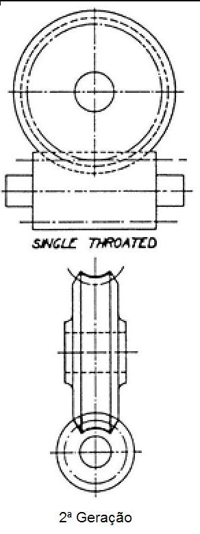 Segunda geração